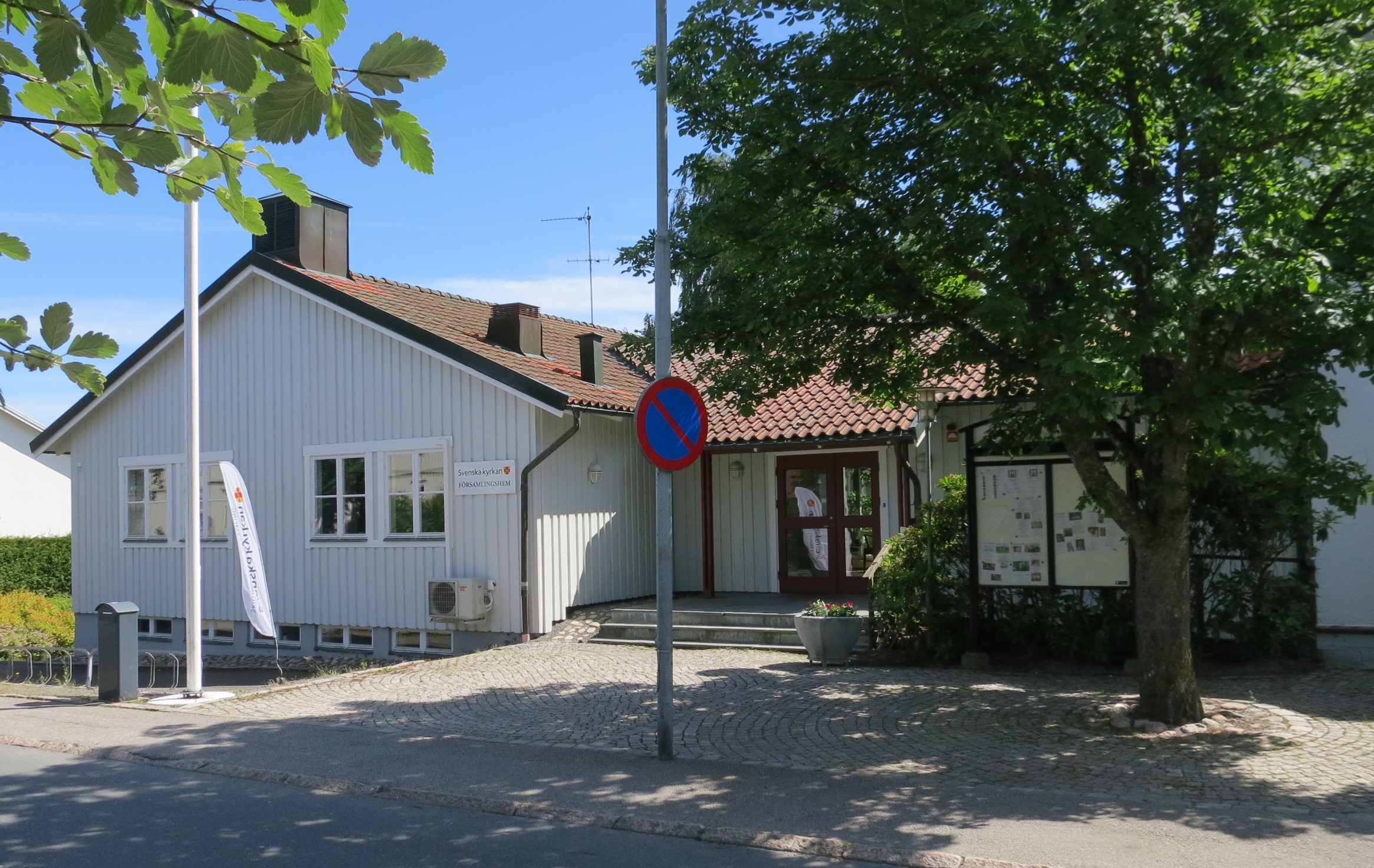 Församlingshemmet vid Skillingaryds kyrka i Småland